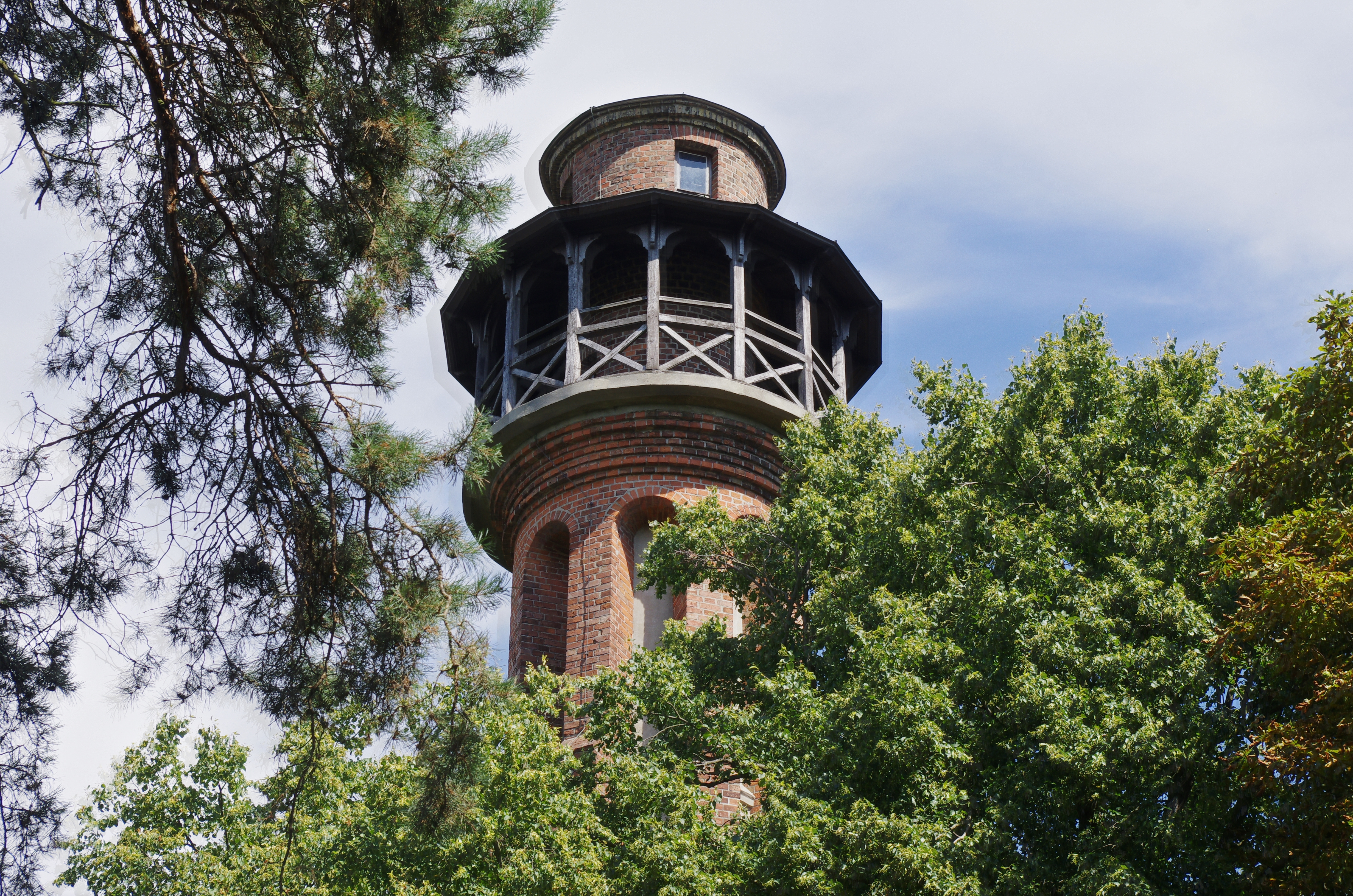 Bad Freienwalde (Oder) in Brandenburg. Der Turm auf dem Galgenberg steht unter Denkmalschutz. Es ist ein Kriegerdenkmal und erinnert an die Kriege im 19. Jahrhundert.